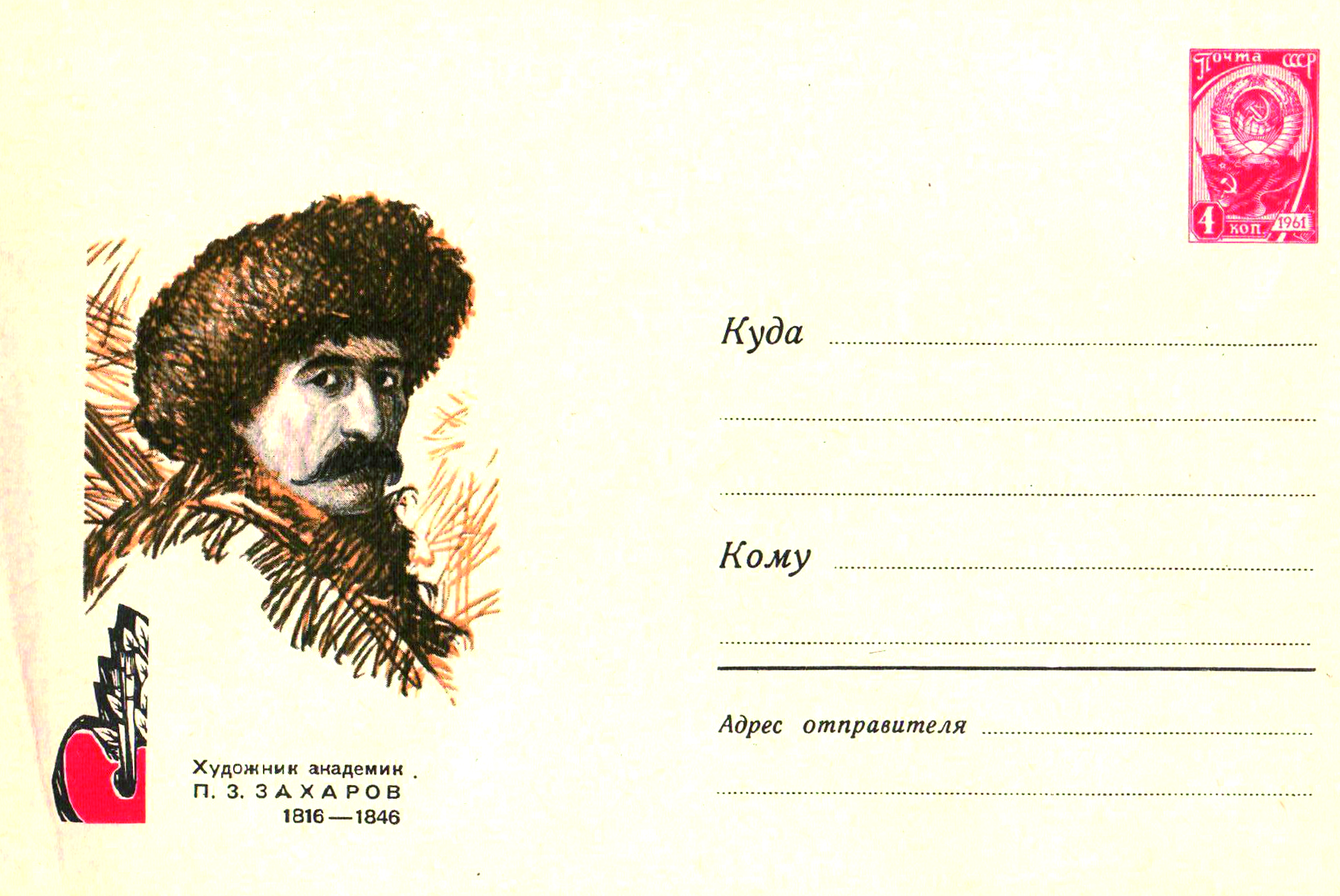 Почтовый конверт СССР Пётр Захарович Захаров-Чеченец